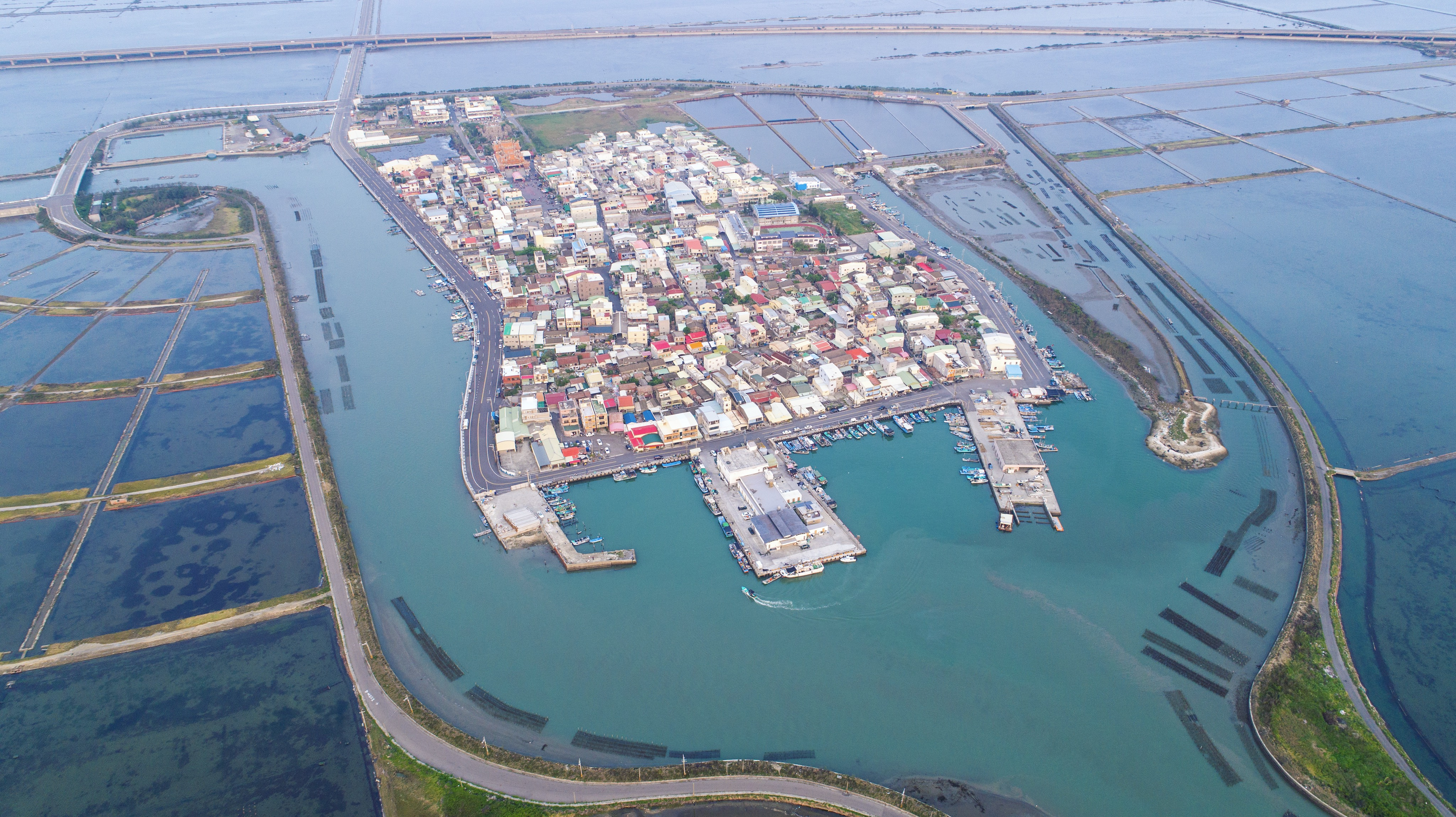 中文（台灣）: 將軍區青鯤鯓